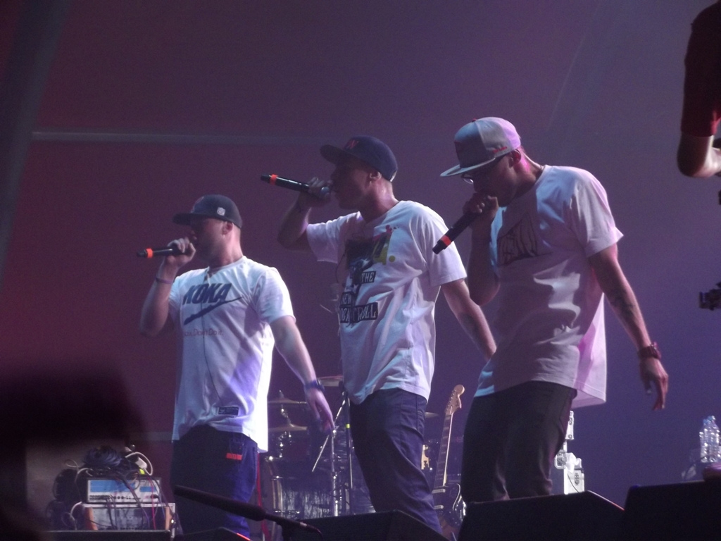 Zdjęcie zrobione podczas pierwszego dnia Coke Live Music Festival 2012 w Krakowie.